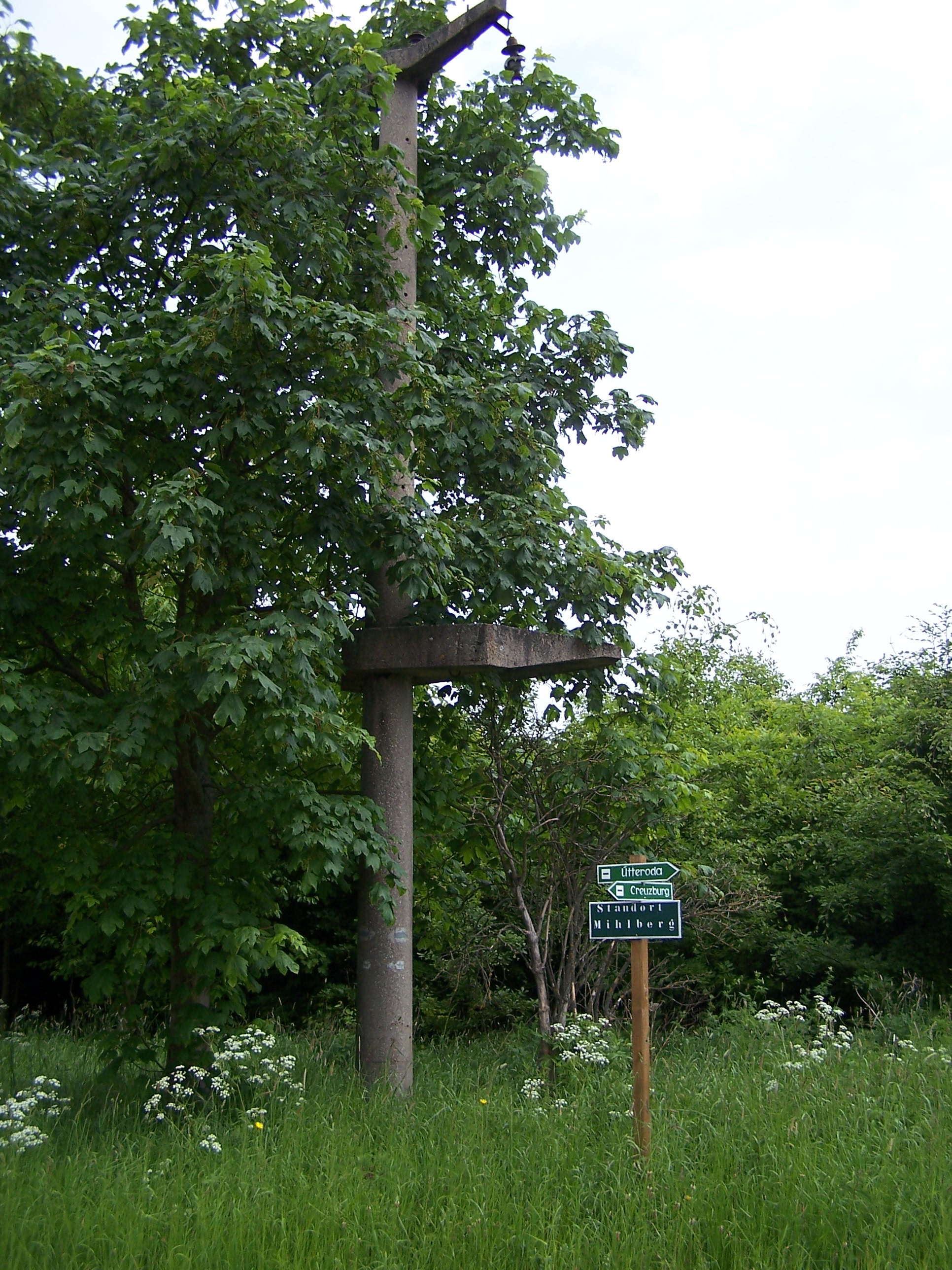 Auf dem Mihlberg